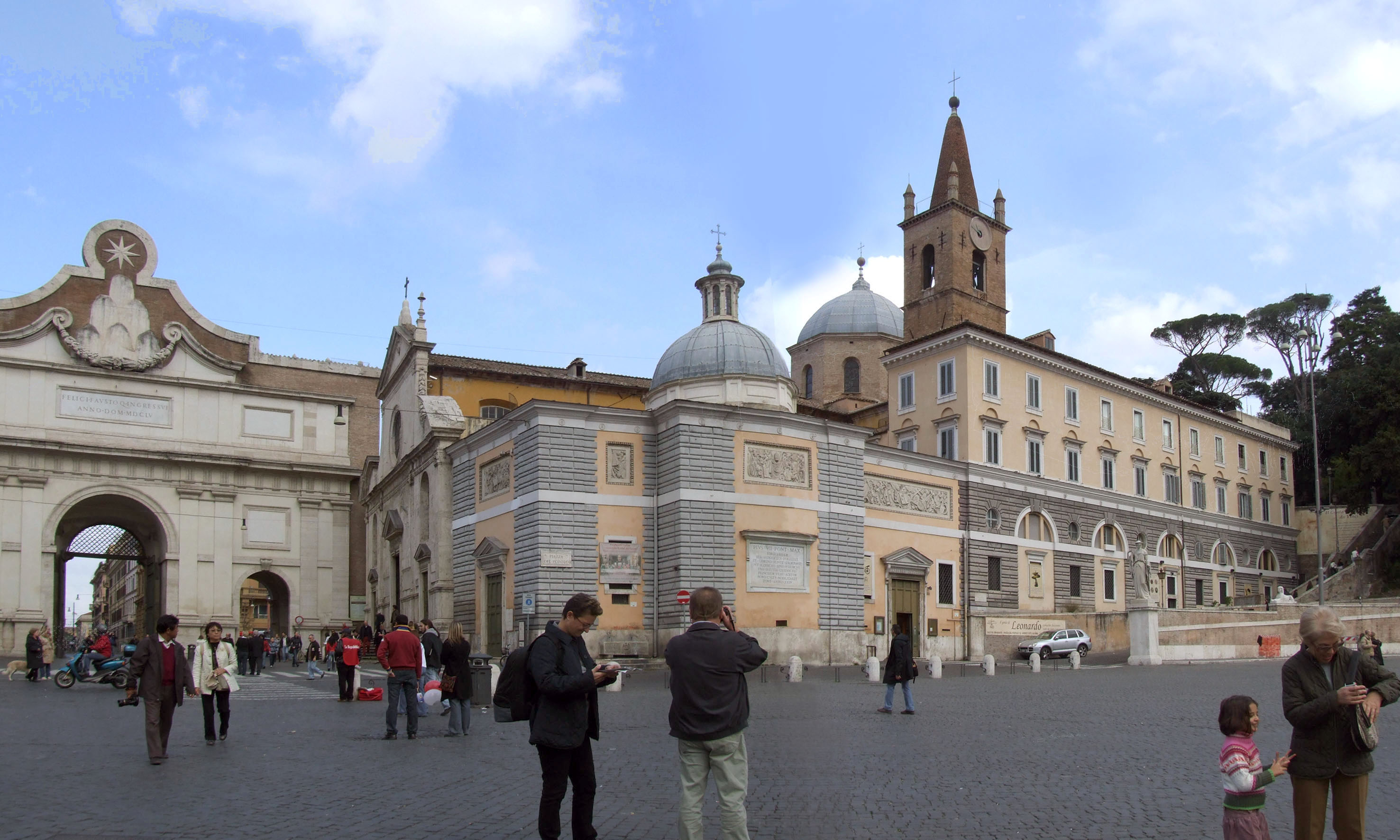 Santa Maria del Popolo a Roma.